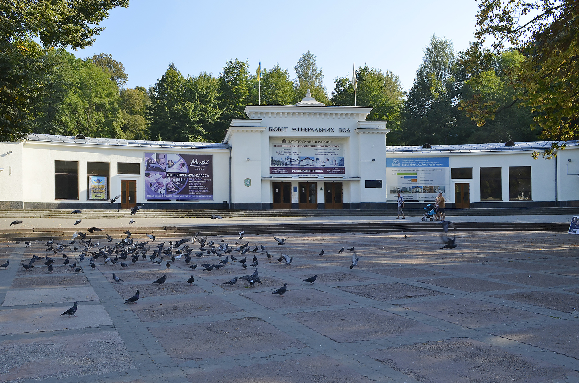 Основний Бювет курорту (лікувальні води: Нафтуся, Марія, Софія)